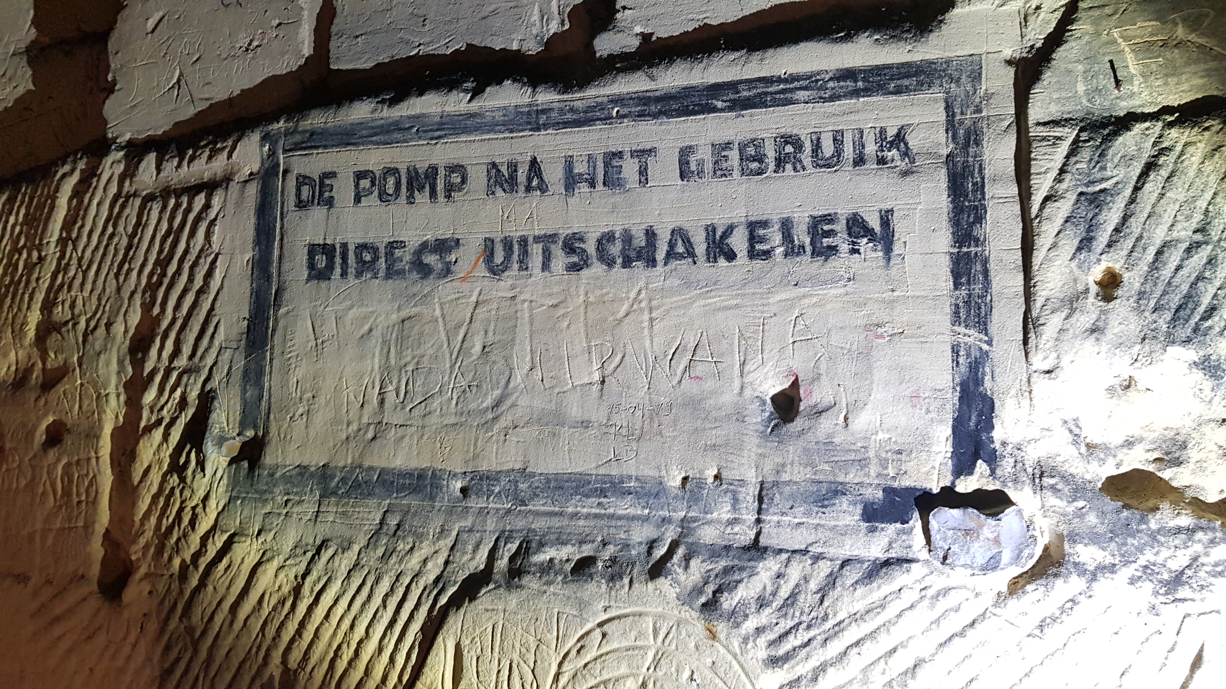 Gangenstelsel Zonneberg in de Sint-Pietersberg, Maastricht, Nederland